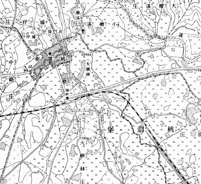 1904台灣堡圖中的桃園仔車站。